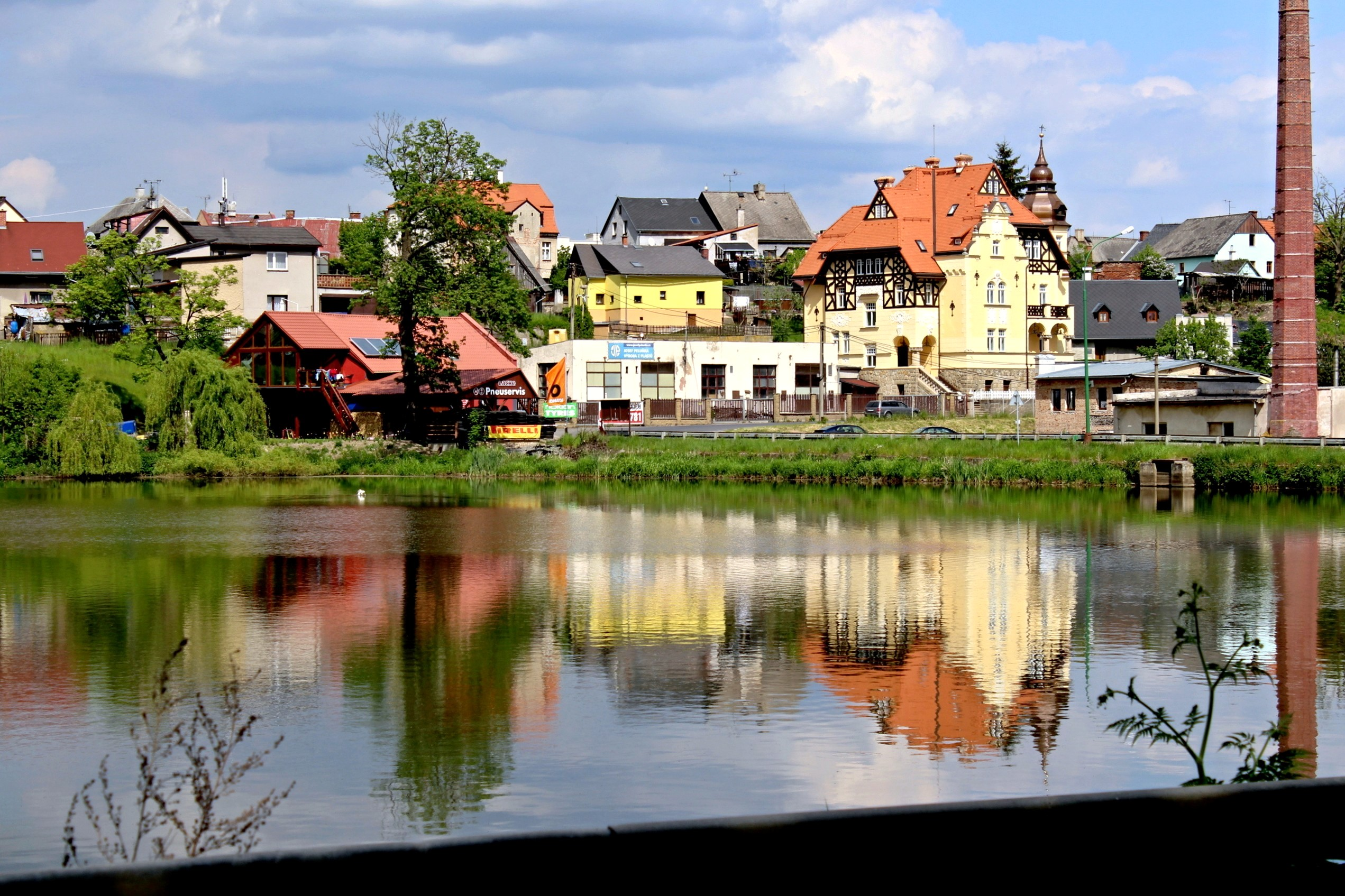 Jablonné